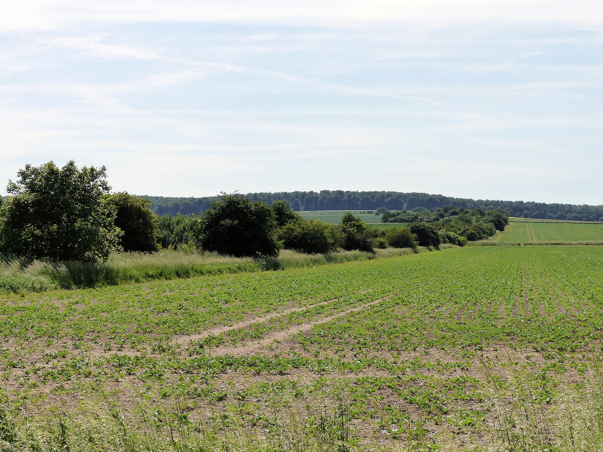 Historischer Hohlweg westlich von Ohrum in den Oderwald (Deitweg).